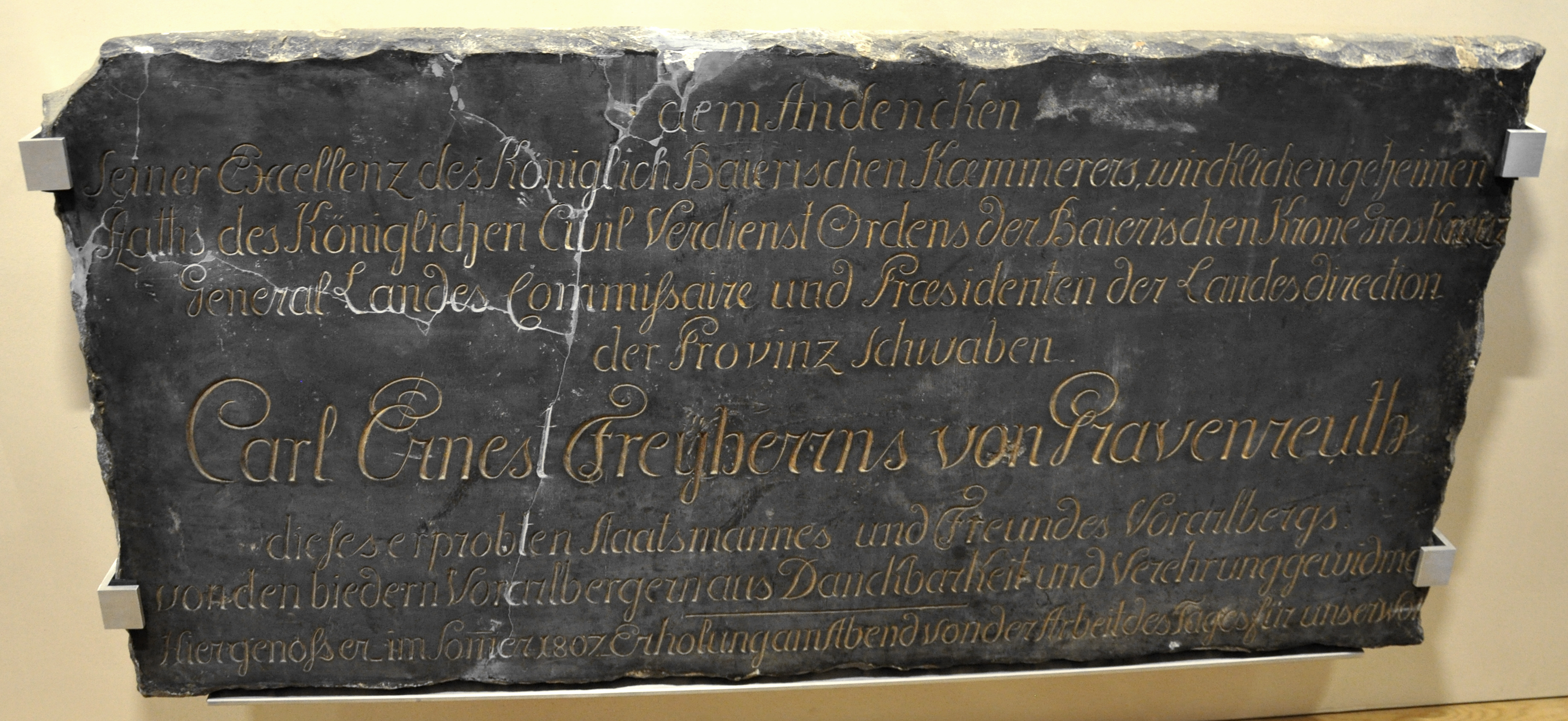 Gedenkplatte für Carl Ernst Freiherr von Gravenreuth aufgrund seiner Verdienste um das Land Vorarlberg unter bayerischer Herrschaft, aufgestellt nach 1807 im Tempelchen an der Bregenzer Klause Bregenz, Vorarlberg Museum vorarlberg museum Native namevorarlberg museumLocationBregenz, Vorarlberg, AustriaCoordinates47° 30′ 16″ N, 9° 44′ 48″ E Established1857WebsiteVorarlberg Museum website